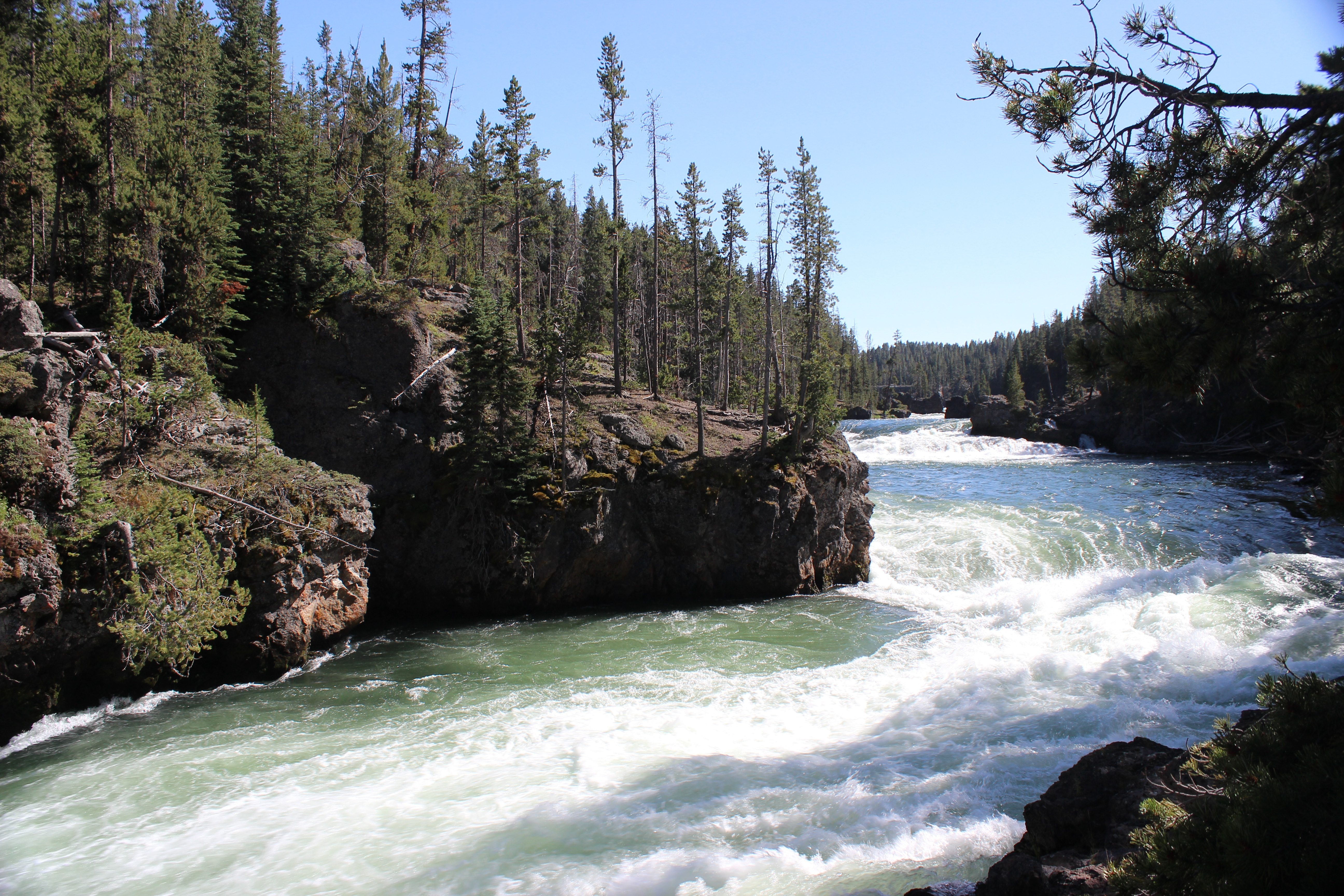 Río Yellowstone justo antes de formar las Upper Falls